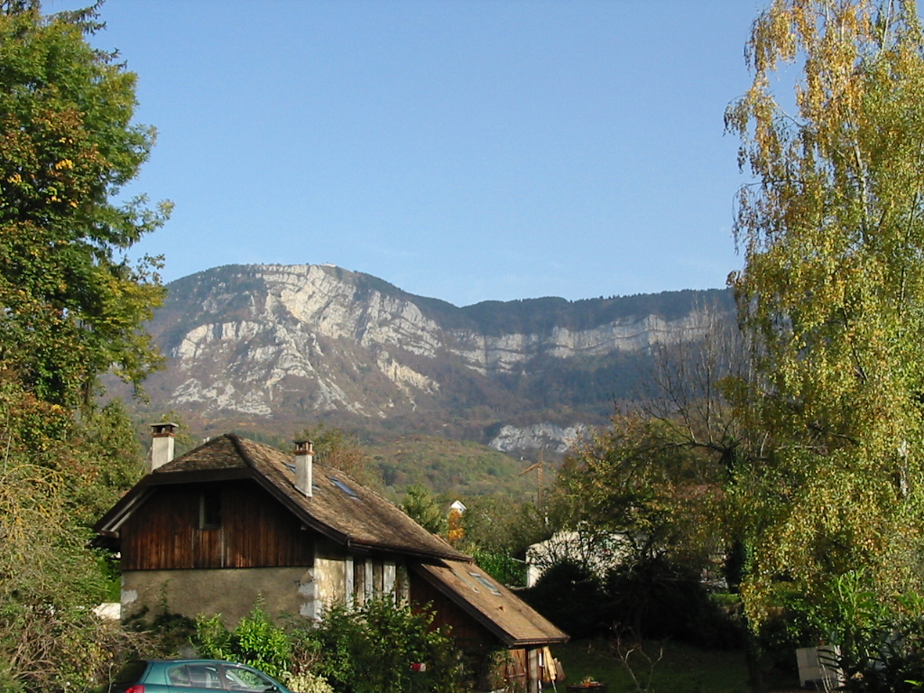 Le mont Revard Sommet des Alpes françaises, dans le massif des Bauges Vue prise d'Aix-les-Bains Photographie personnelle, prise le 27 octobre 2006 Copyright © Christian Amet